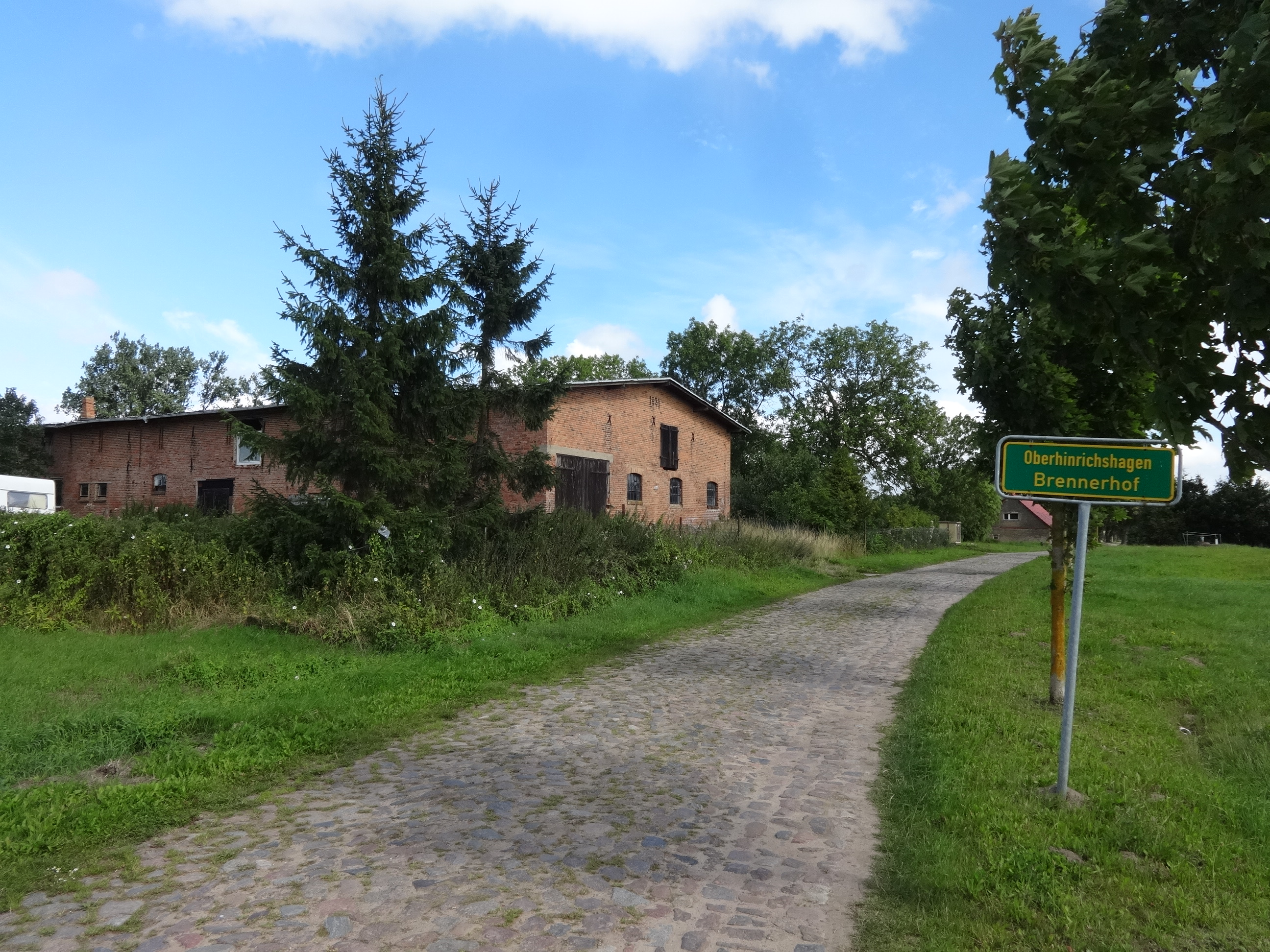 Ortslage Brennerhof des Ortsteils Oberhinrichshagen der Gemeinde Sundhagen in Mecklenburg-Vorpommern